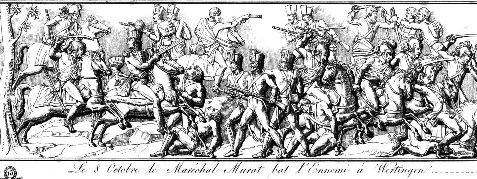 gravure du bas-relief de la colonne, représentant une scène de la bataille de Wertingen.